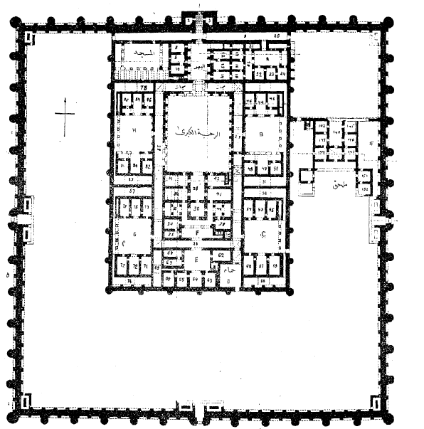 مخطط لقصر الأخيضر في العراق يظهر فيه مبنى القصر بالكامل